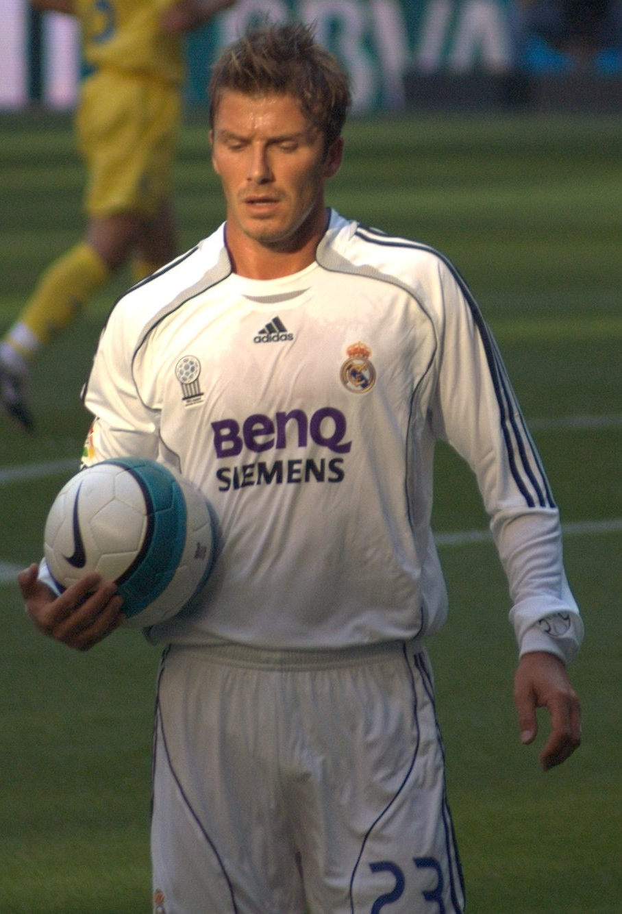 Beckham, Real adına forma giyerken.